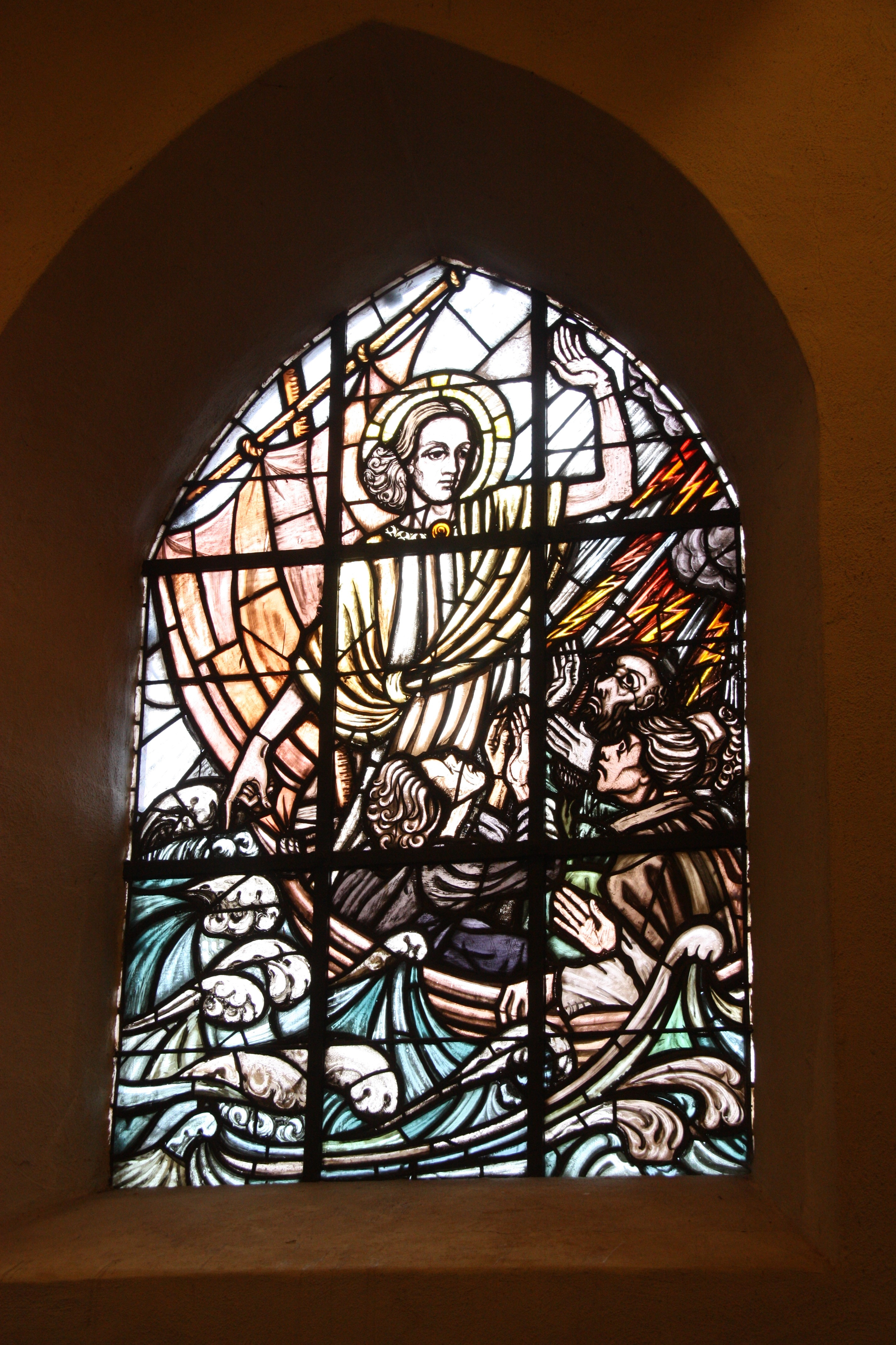 Hamburg, Kirche Alt-Rahlstedt, Fenster "Stillung des Seesturms"